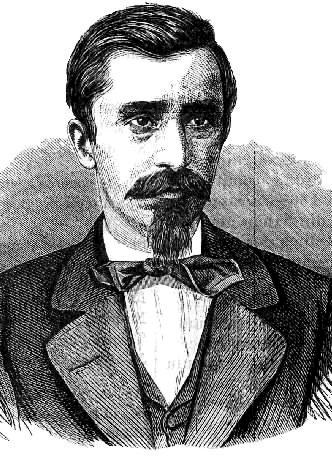 Atanasie Marian Marienescu (n. 1830 - d. 1914)